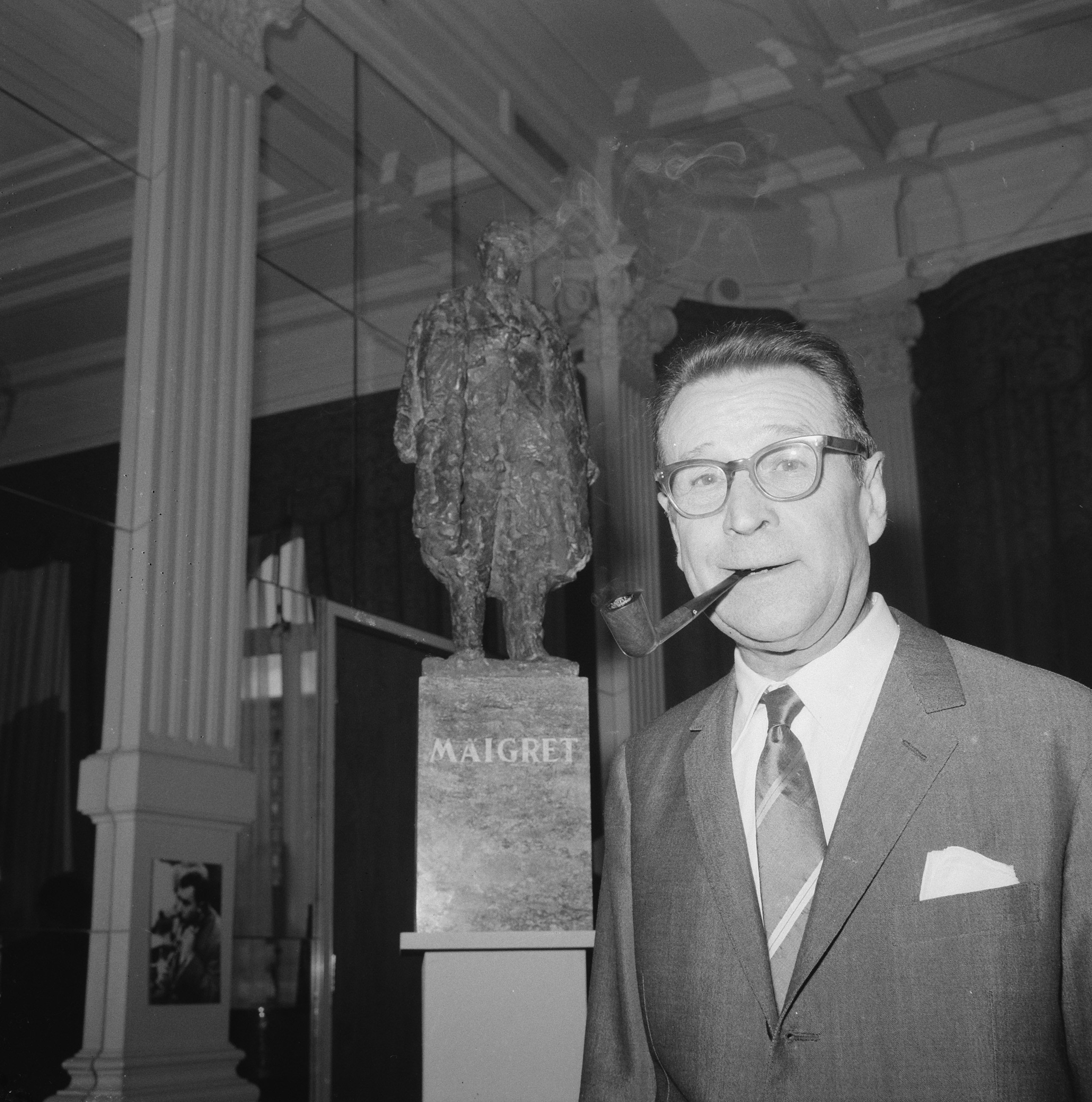 Collectie / Archief : Fotocollectie Anefo Reportage / Serie : Bezoek van de auteur Georges Simenon aan Amsterdam Beschrijving : Belgische detective schrijver bij het beeldje van Maigret in het Amstelhotel Datum : 2 september 1966 Locatie : Amsterdam, Noord-Holland Trefwoorden : beelden, portretten, schrijvers Persoonsnaam : Magrait, Simenon, Georges Fotograaf : Evers, Joost / Anefo Auteursrechthebbende : Nationaal Archief Materiaalsoort : Negatief (zwart/wit) Nummer archiefinventaris : bekijk toegang 2.24.01.03 Bestanddeelnummer : 919-5217 Reacties Geplaatst door Televisiespel liefhebber op 20 oktober 2017 - 18:44. Miniatuur exemplaar van het beeld naar een ontwerp van Pieter d'Hondt. Het grote exemplaar staat in Delfzijl. Het beeld werd gemaakt in opdracht van Uitgeverij Bruna ter gelegenheid van het verschijnen van het 1.000-ste Zwarte Beertje (een populair pocketboekje).